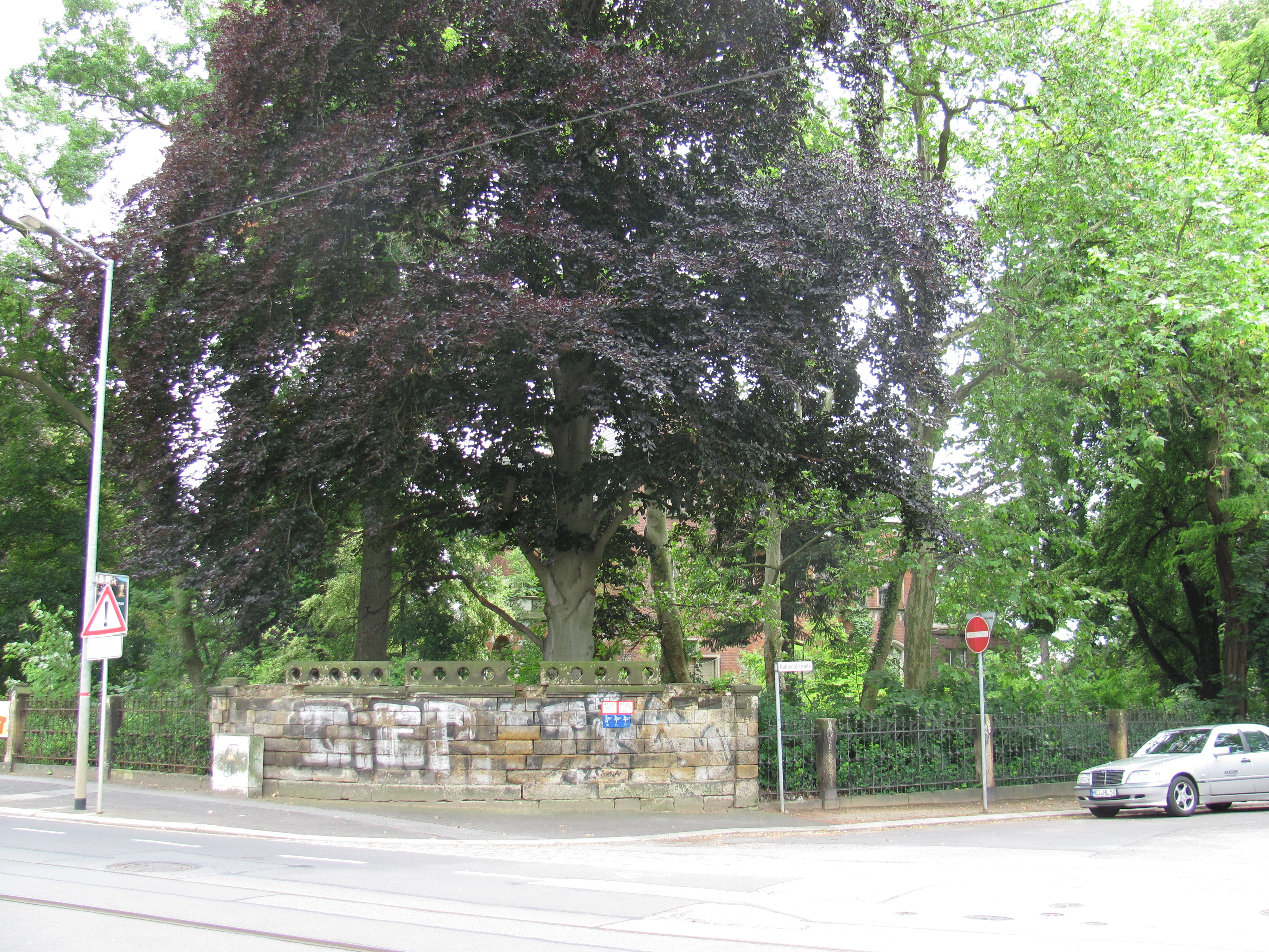 Radebeul Villa Kolbe